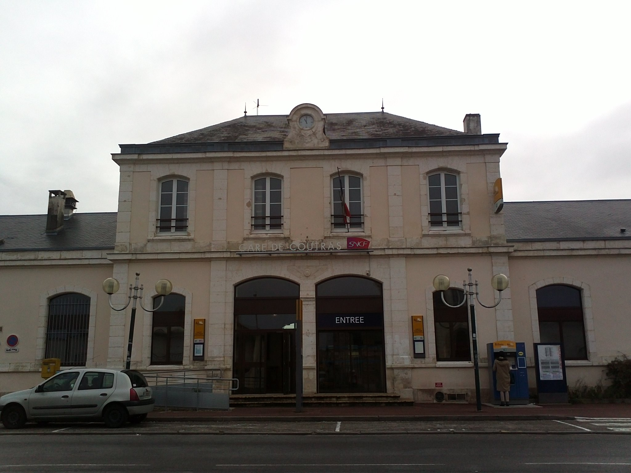 Gare de Coutras en Novembre 2013